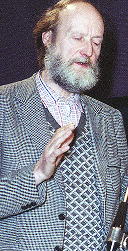 Jaan Ruus, Heiki Ernits, Janno Põldma ja Rao Heidmets 94